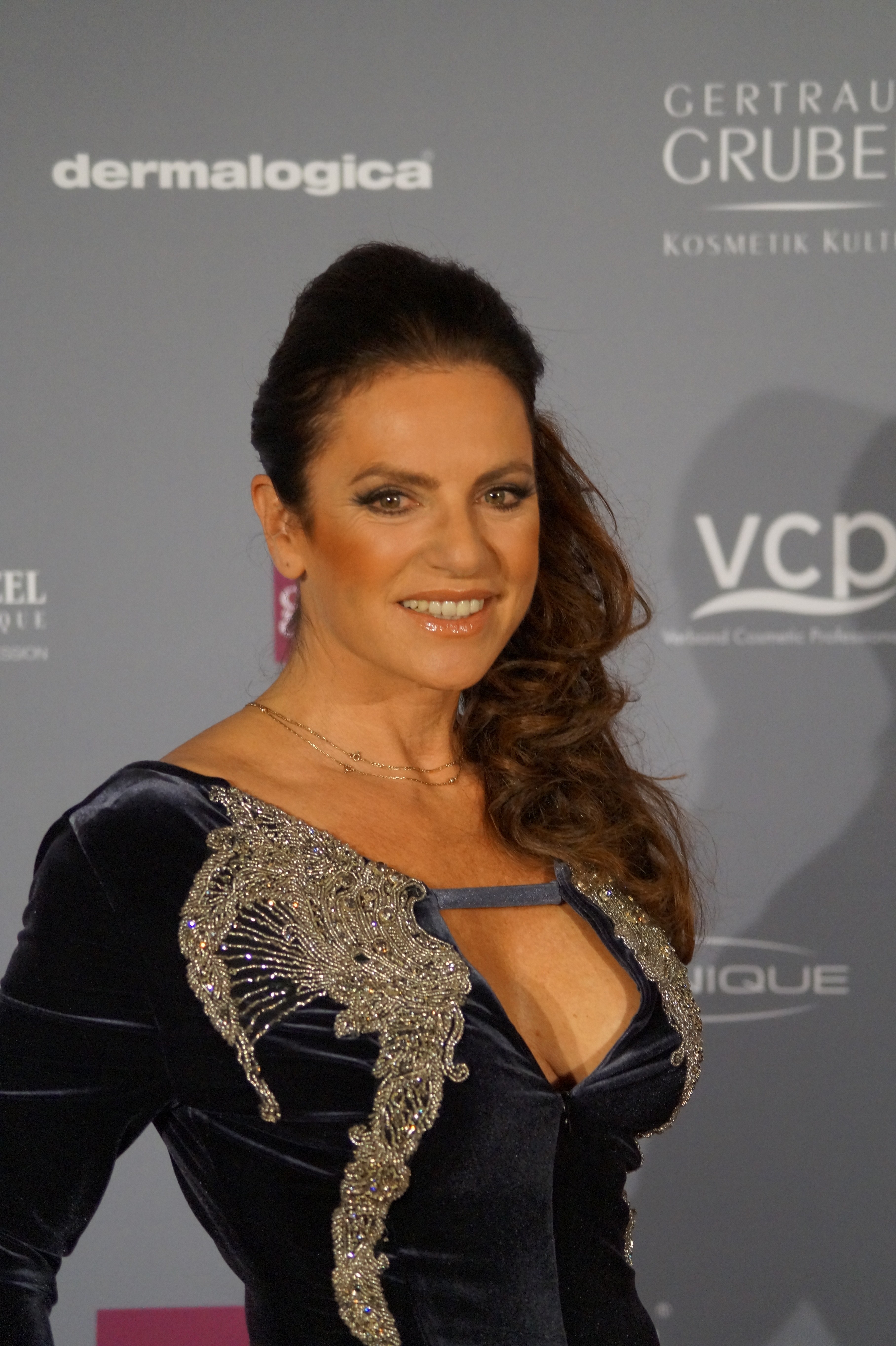 "Gloria – Deutscher Kosmetikpreis" am 27. März 2015 im Hilton Hotel Düsseldorf.